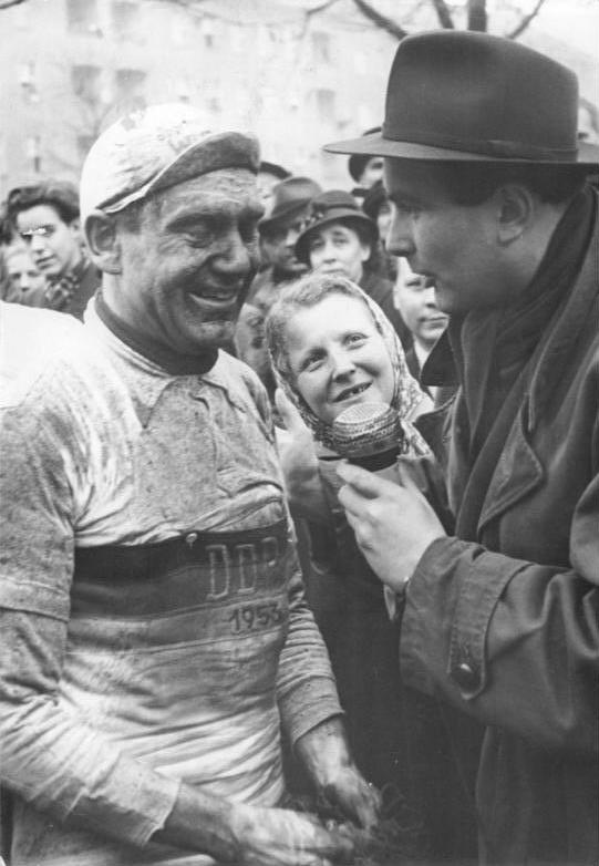 Bernhard Trefflich Zentralbild Funck 3 Mot. 4.4.1954 Eröffnungsrennen der Straßenfahrer Am 4.4.1954 wurde mit dem traditionellen Rennen der Strassenfahrer Berlin-Angermünde-Berlin die Saison eröffnet. Sieger wurde der DDR-Meister Bernhard Trefflich. UBz: Der Sieger des Rennens DDR-Meister Bernhard Trefflich.